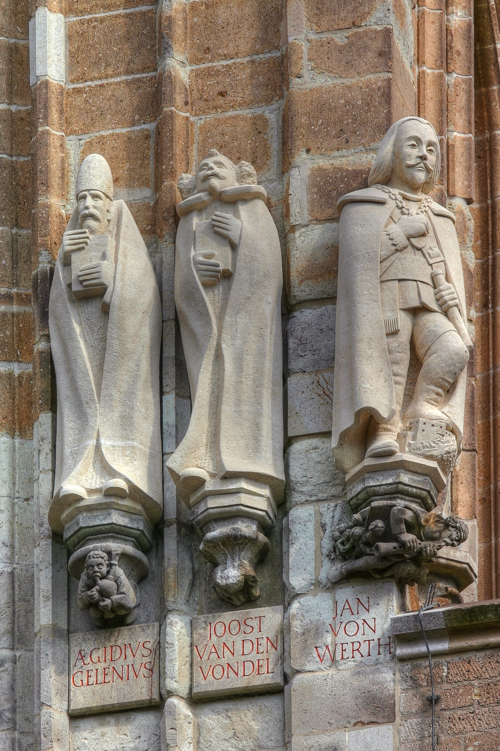 Rathausturm Köln mit den Figuren: Aegidius Gelenius, Joost van den Vondel und Jan von Werth Details zu den Statuen: Bildhauer der Aegidius Gelenius: Paul de Swaaf Bildhauer der Joost van den Vondel: Paul de Swaaf Bildhauer der Jan von Werth: Hans-Joachim Bergmann Details zu den Konsolen: Thema der Konsole unter der Statue des Aegidius Gelenius: „Sackpfeifer“. Bildhauer: Herbert Rausch Thema der Konsole unter der Statue des Joost van den Vondel: „Mönch“. Bildhauer: unbekannt (1865 ausgeführt) Thema der Konsole unter der Statue des Jan von Werth: „Der Rattenfänger von Hameln“. Bildhauer: Gerd Haas